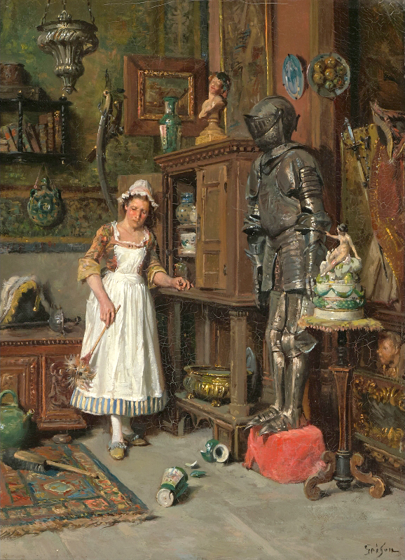 La nouvelle chambrière